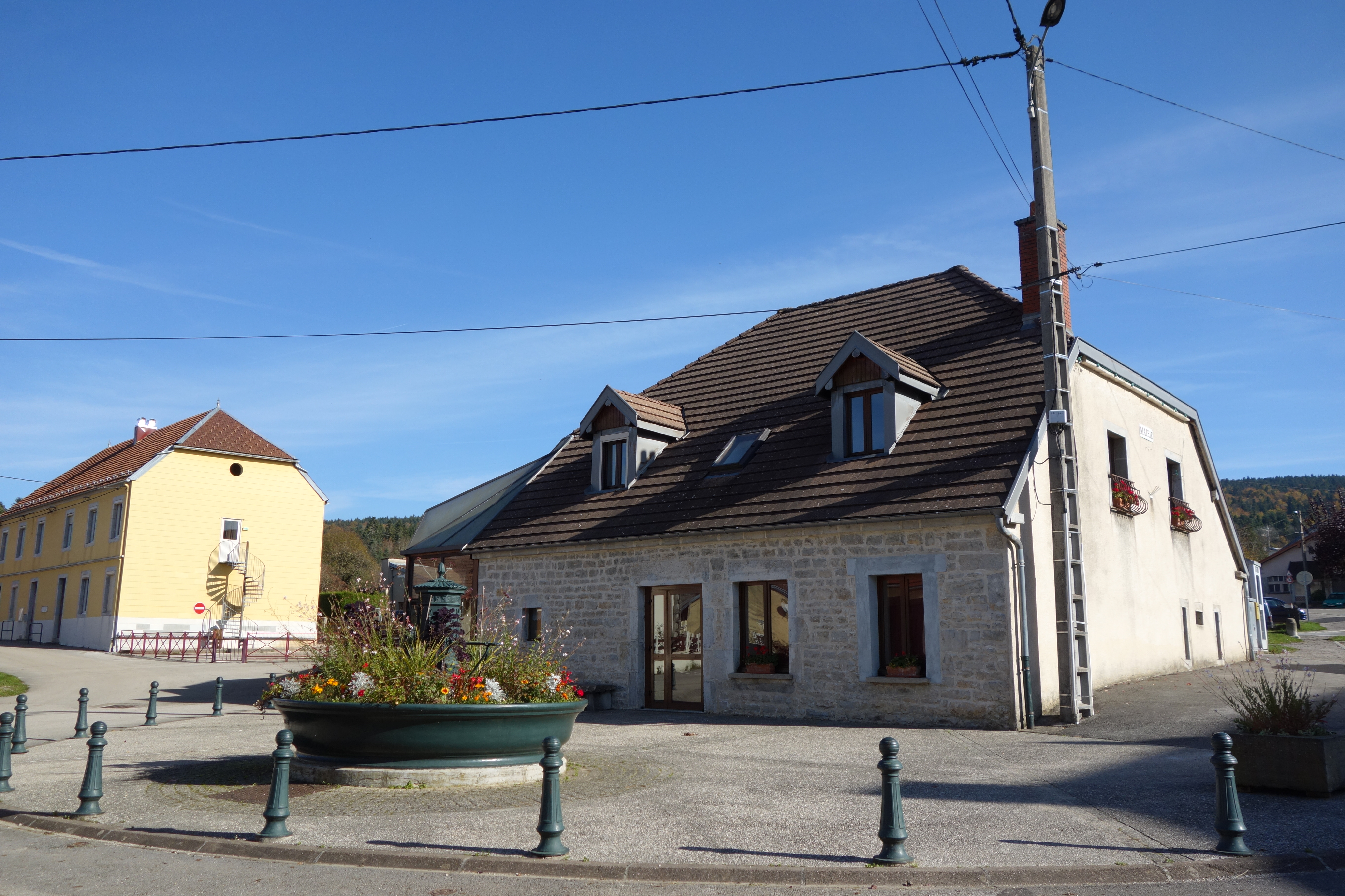 Saint-Germain-en-Montagne (Jura) place centrale (fontaine et mairie)